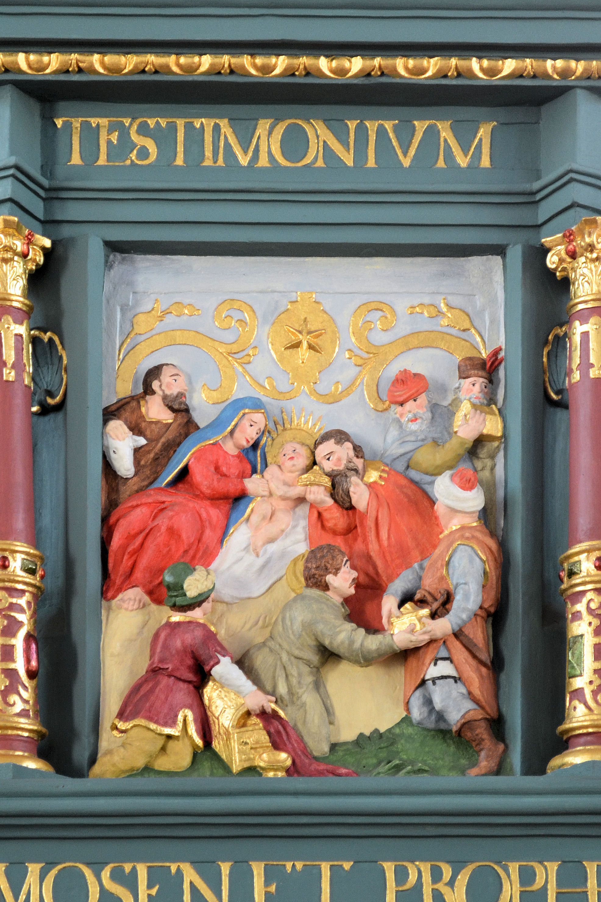 Kościół Narodzenia Najświętszej Maryi Panny w Gryfinie